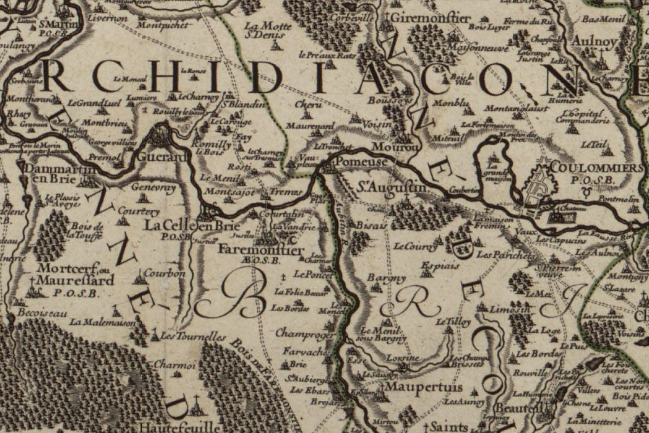 extrait de la carte de l'Eveché de Meaux